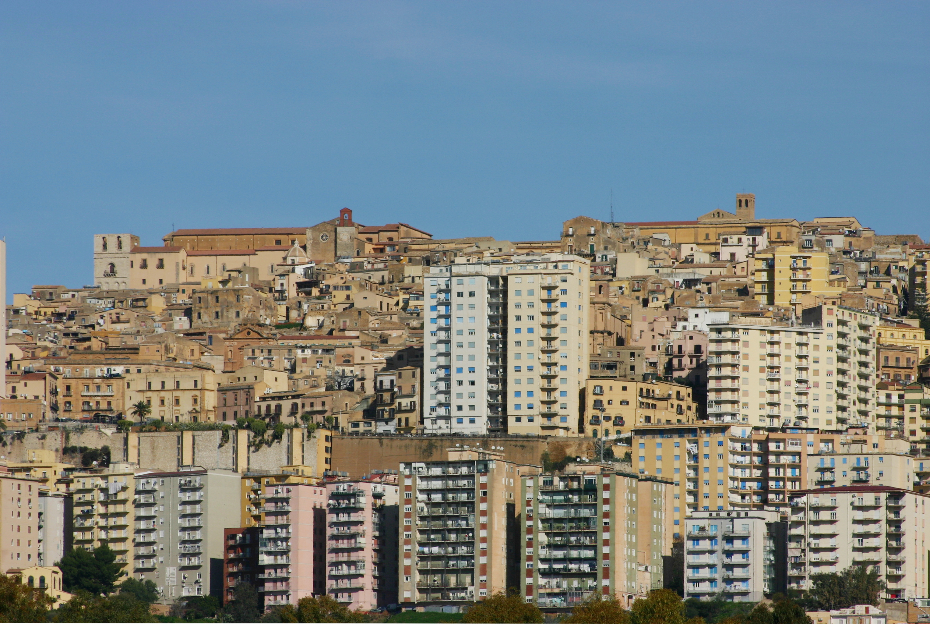 Views of Agrigento